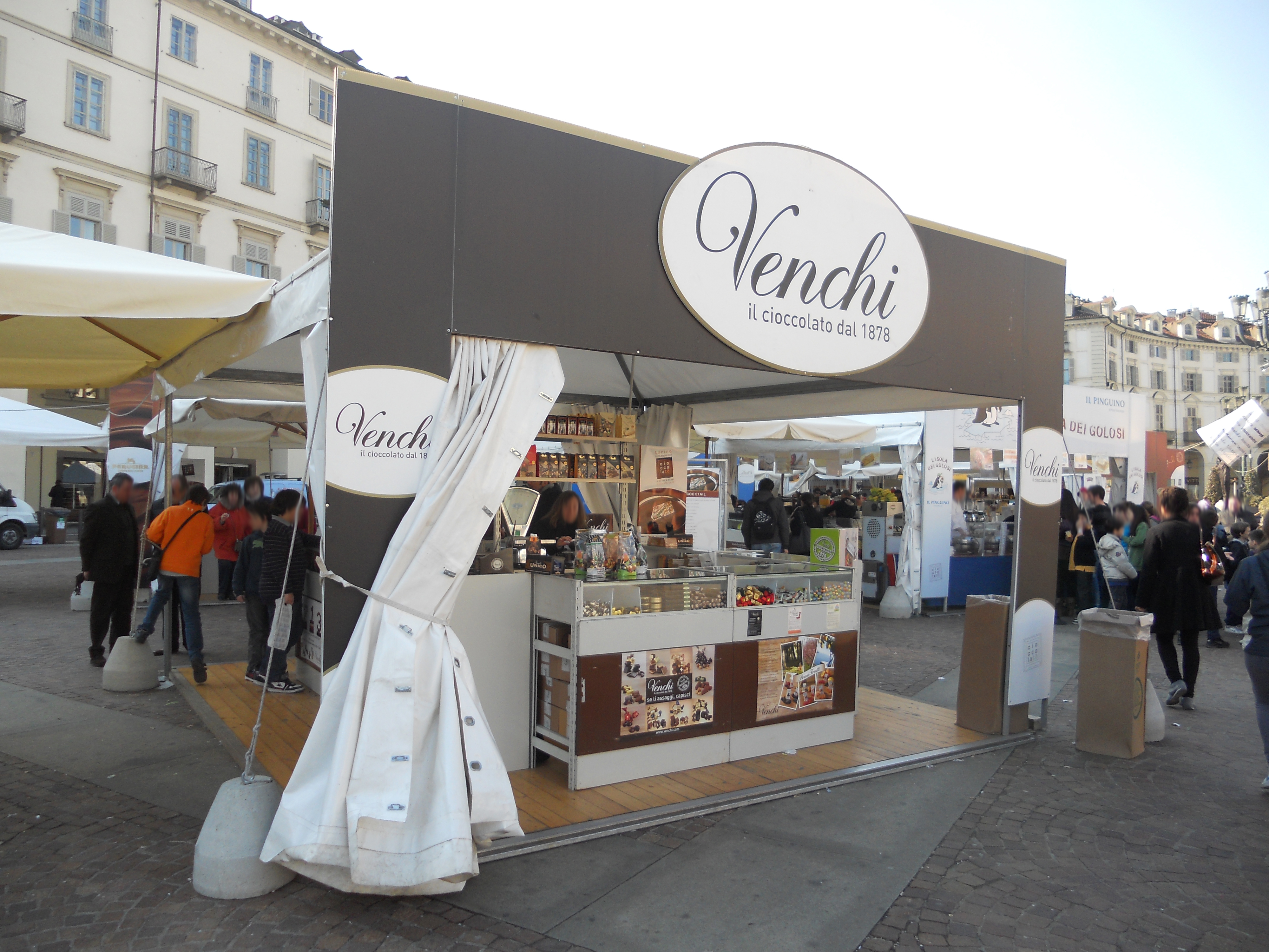 L'evento "CioccolaTò" a Torino nel marzo 2012